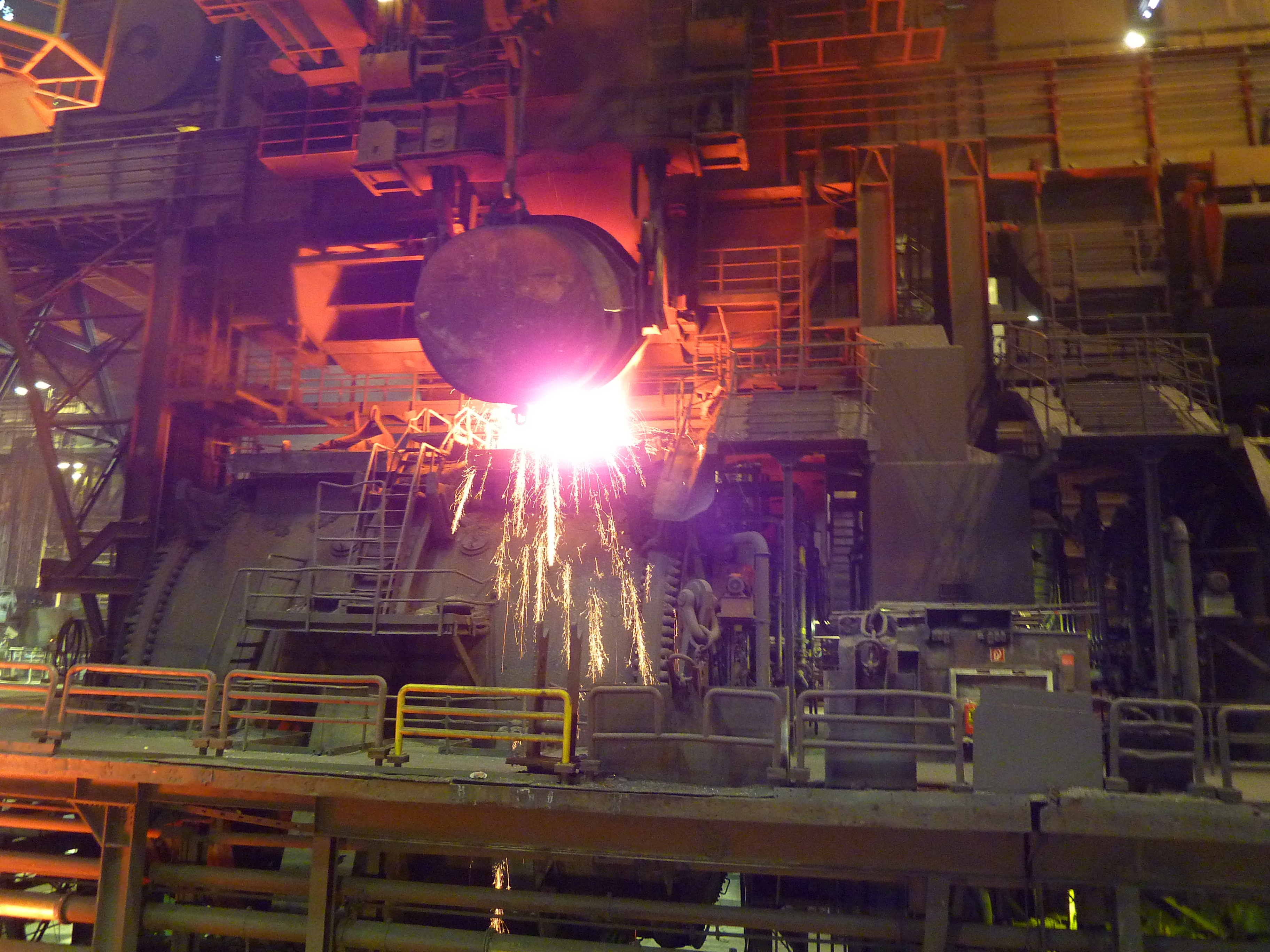 Befüllung eines Roheisenmischers der HKM Duisburg